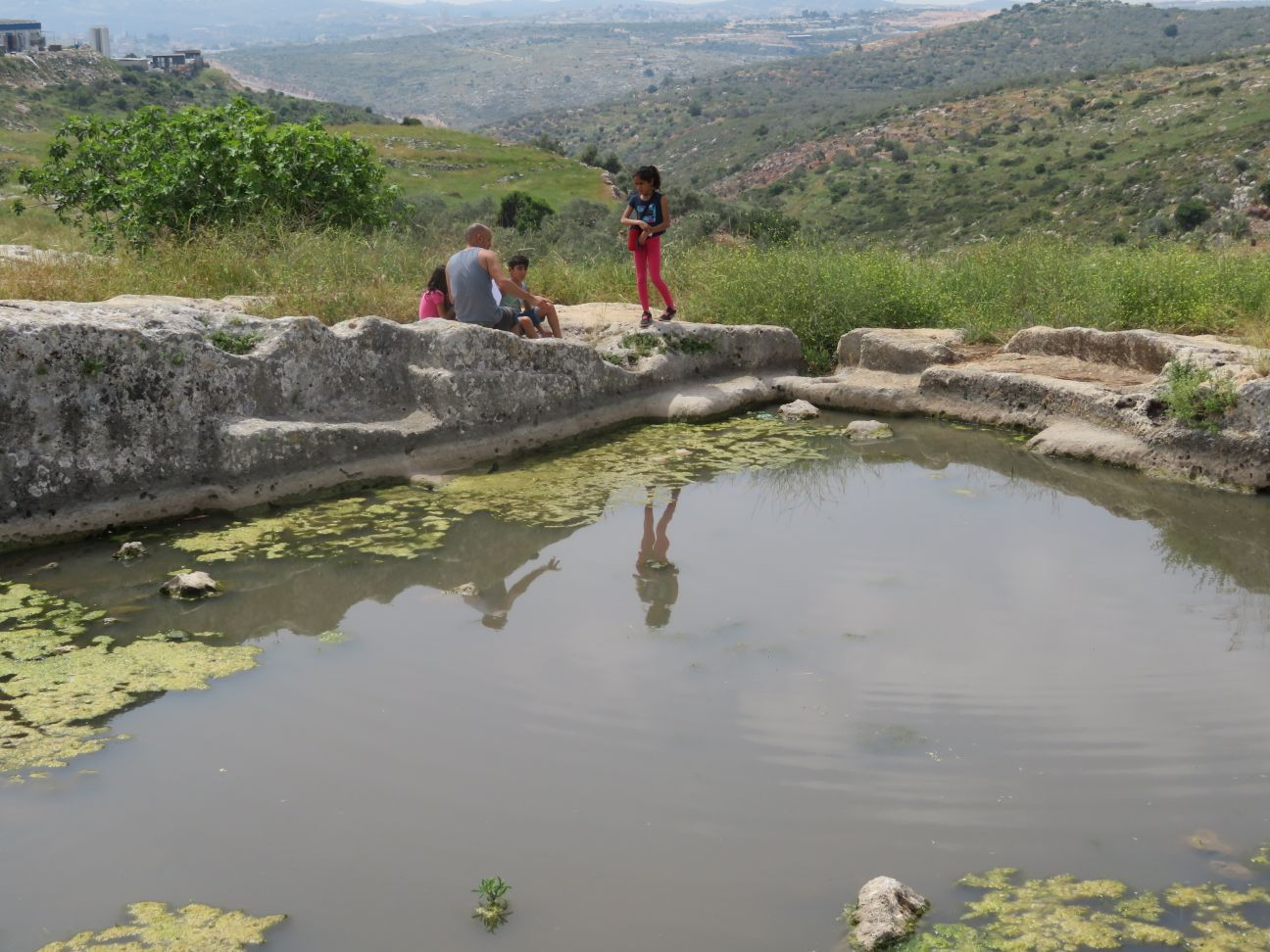 מחצבה מלאה במי גשמים באתר גתות ברקן